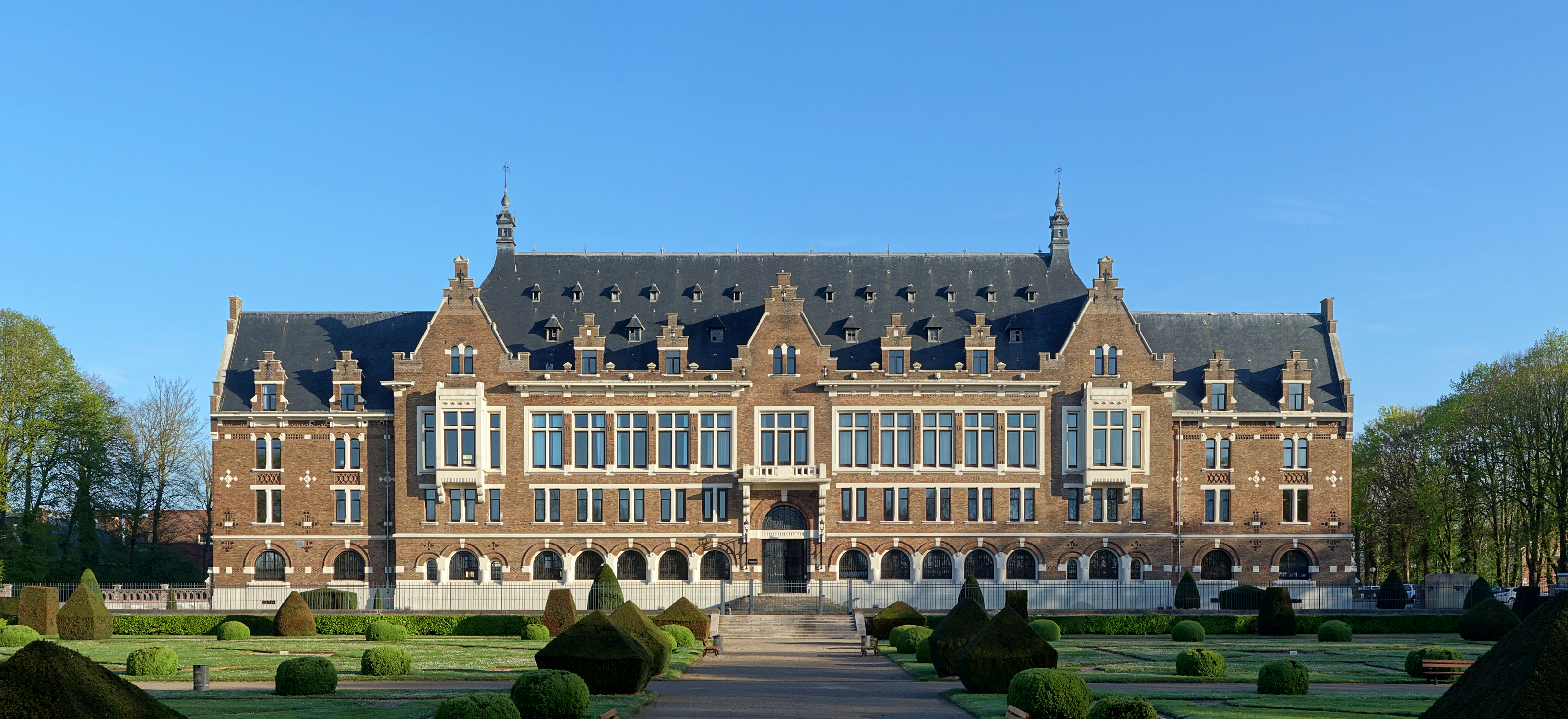 Les Grands Bureaux de la Compagnie des mines de Lens